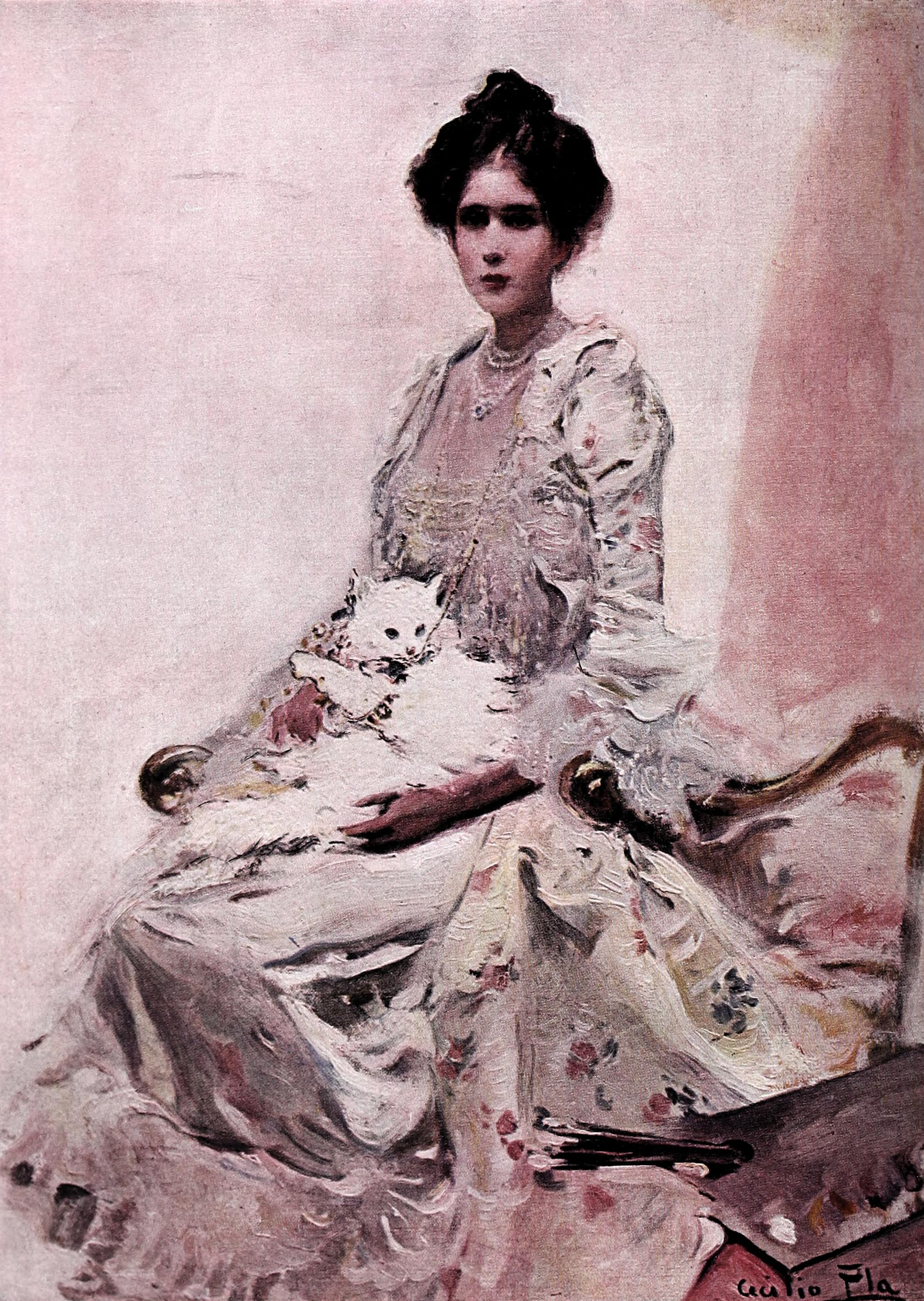 Figuras teatrales. La gata de Angora.